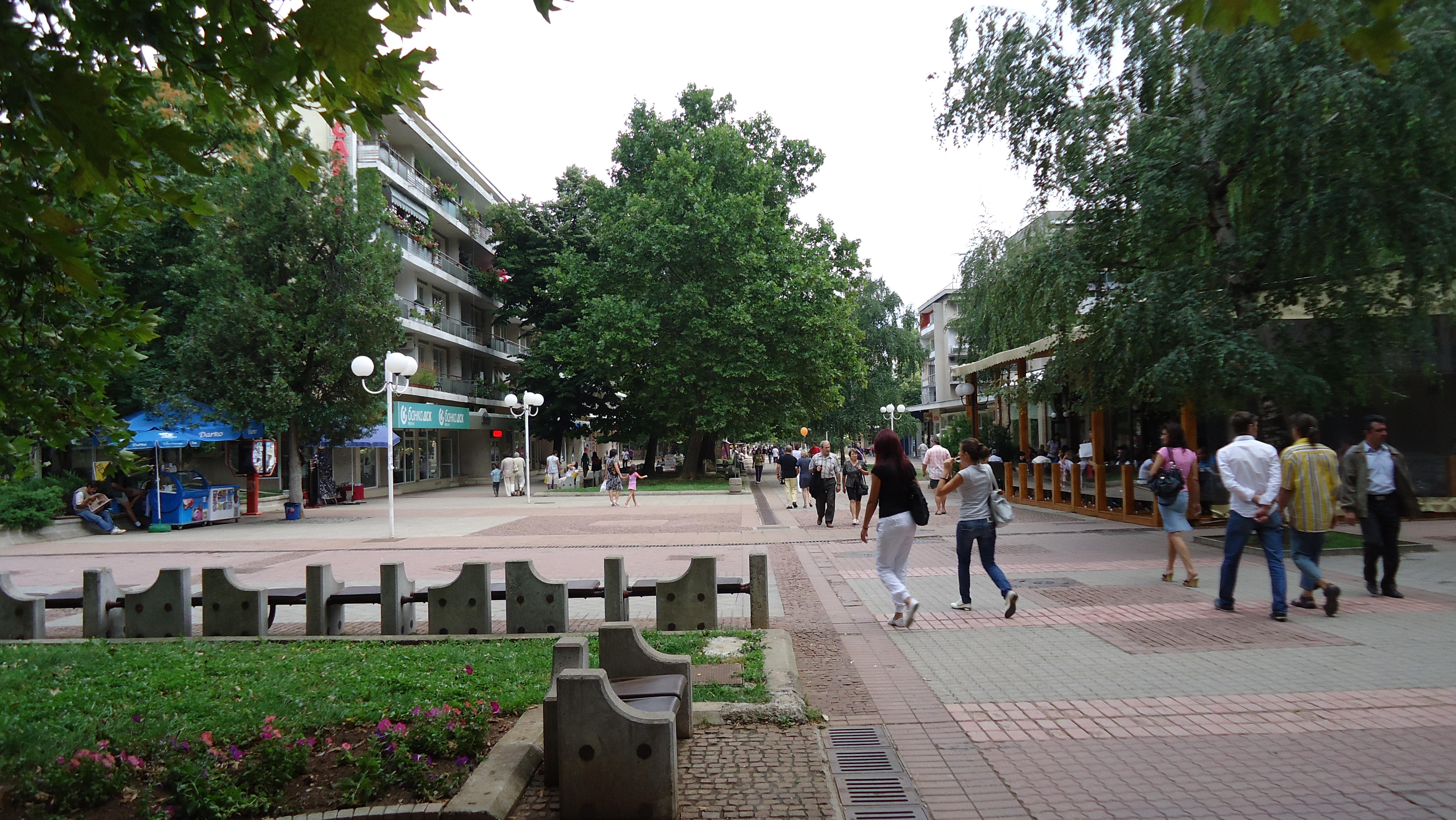 Бул. „Никола Войводов“ - първата в България обособена пешеходна улица, изградена в началото на 1980-те години.